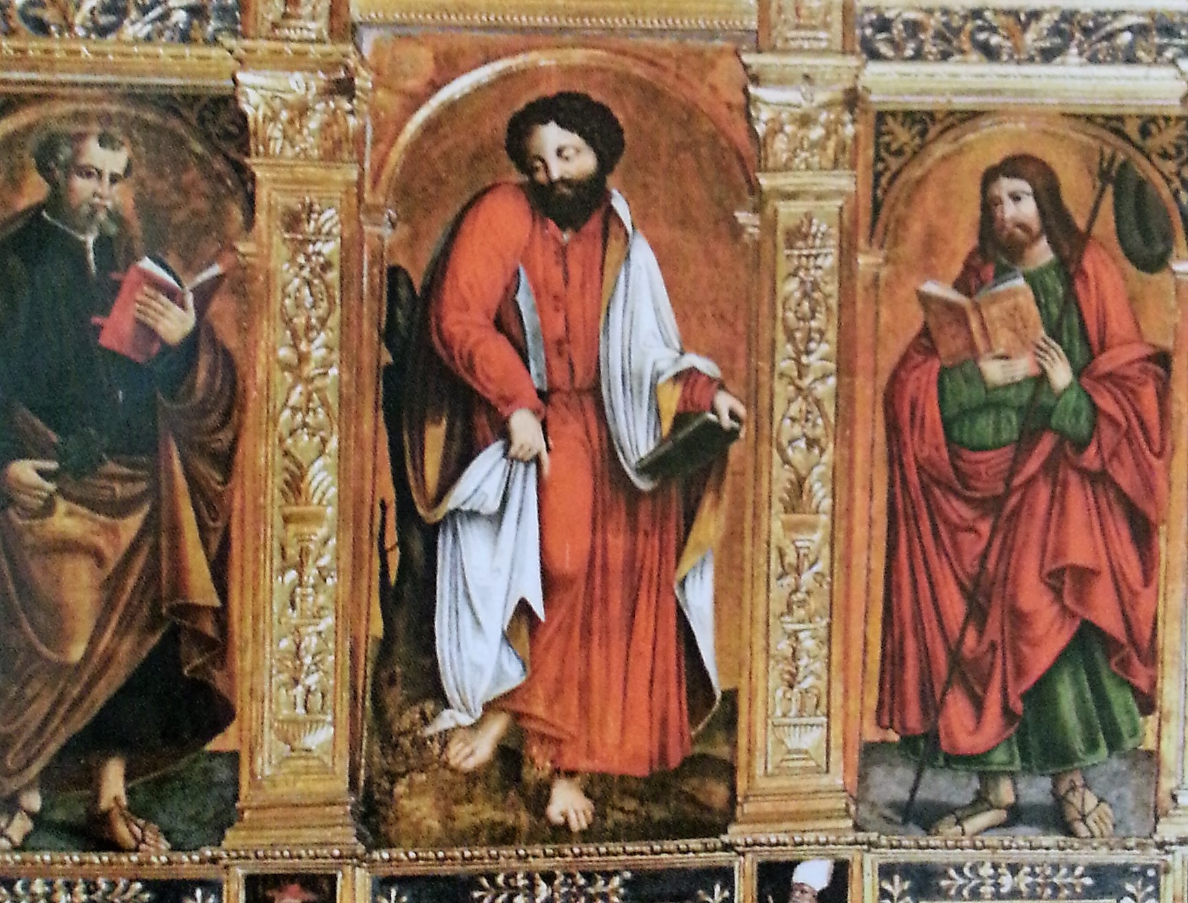 Particolare del politico di San Bartolomeo